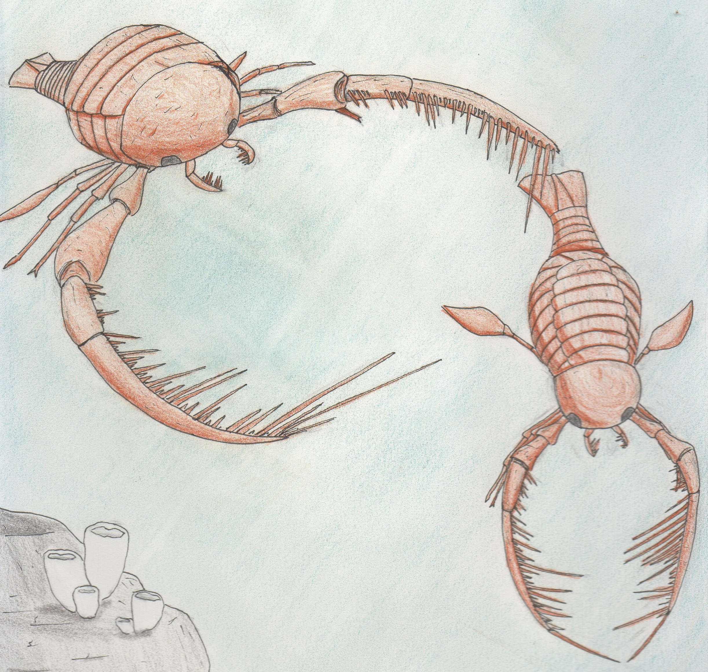 Deux euryptérides du genre Megalograptus nageant au dessus d'éponges